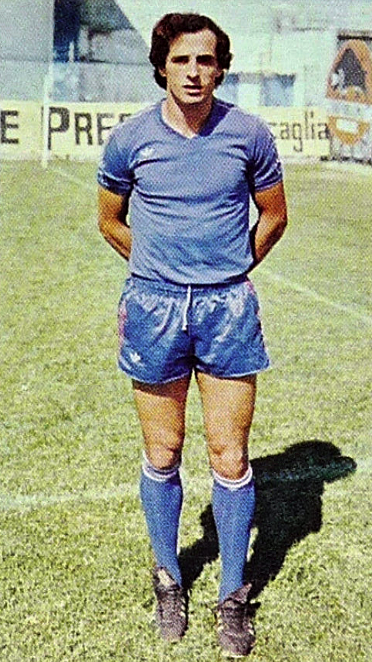 Charles Orlanducci en 1976, 'Panini Foootball 1976 - 1977', Panini figurina n°31.